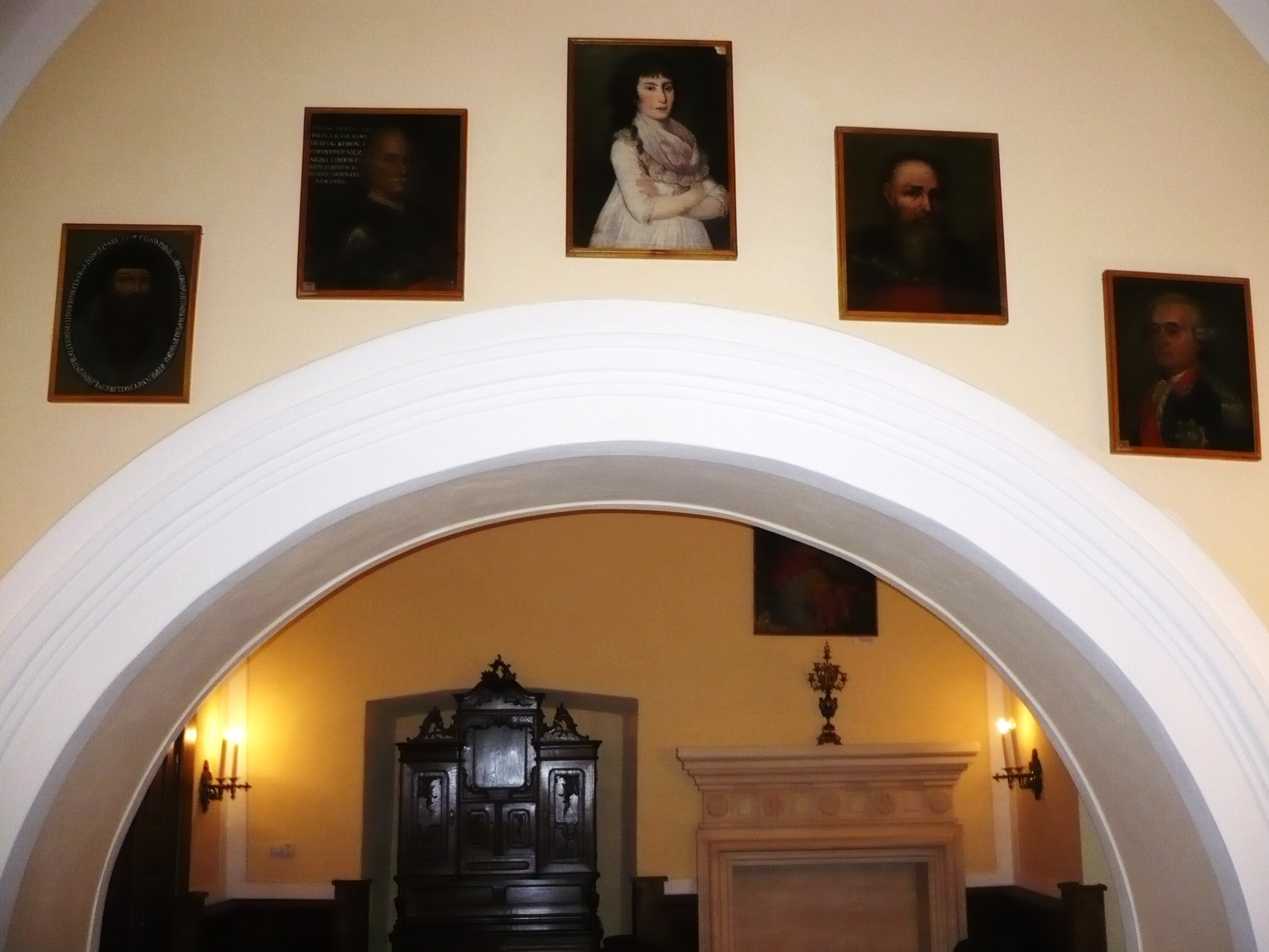 Zbaraż, sala zamku